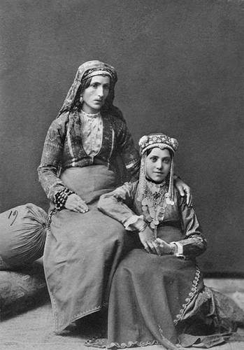 Armenian women.